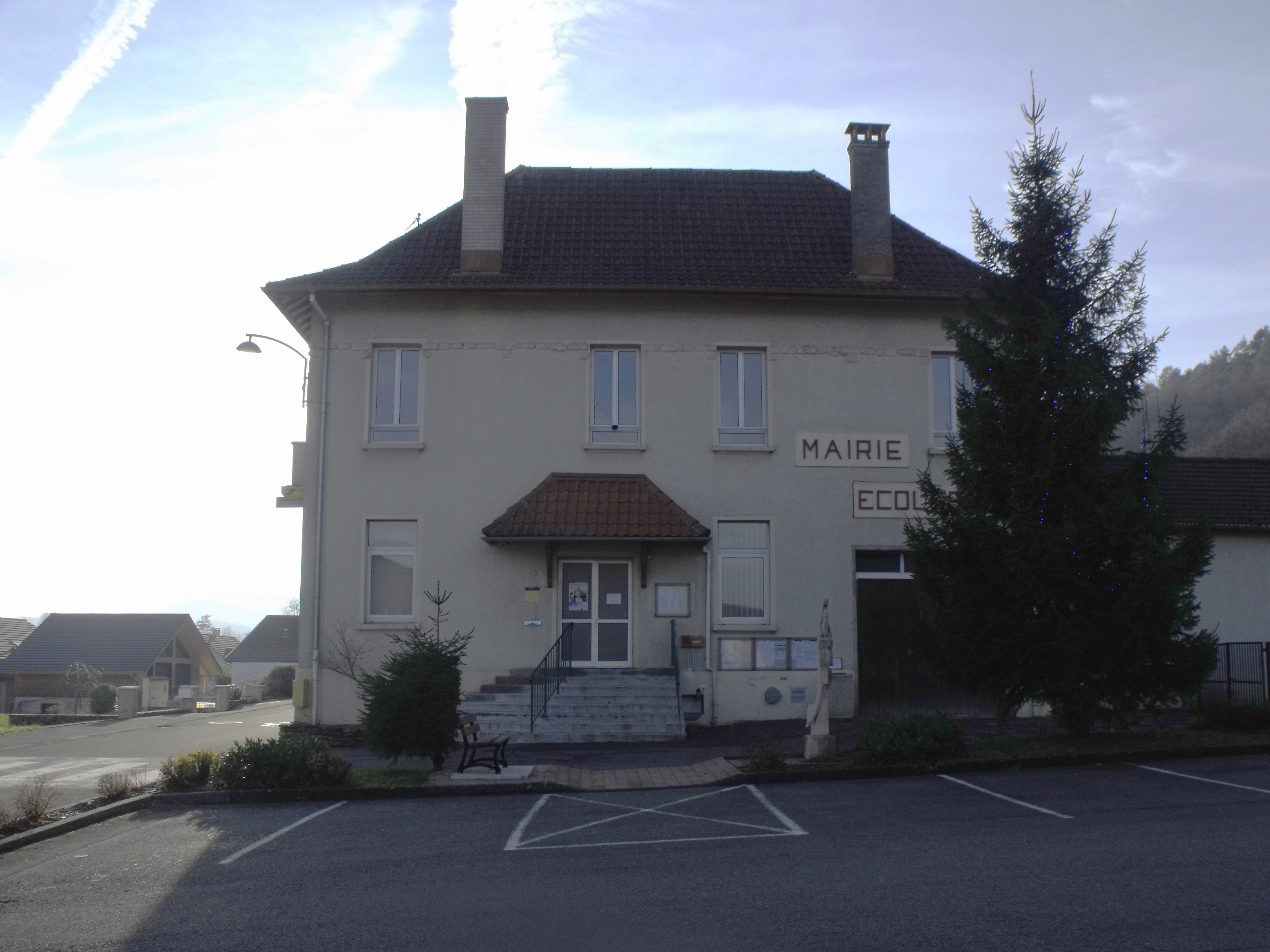 Mairie-école de Bourguignon, Doubs, France